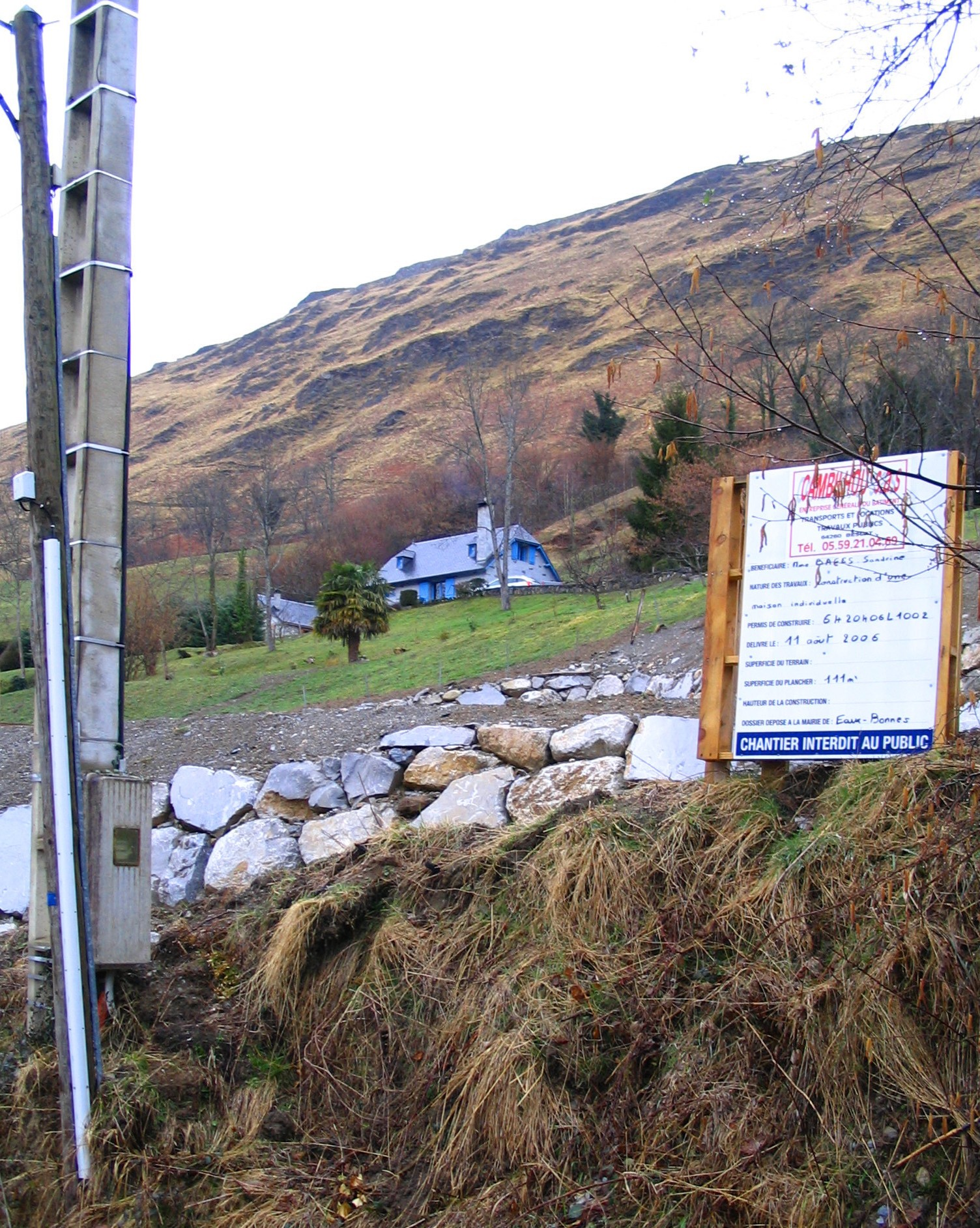 Constructions individuelles sur la zone protégée de la Montagne Verte - Aas - Pyrénées Atlantiques Author:P.Charpiat 2007